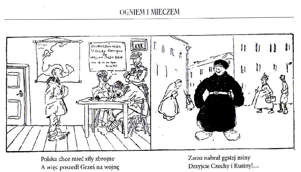 Przygody szalonego Grzesia, pierwszy polski komiks (wydany w 1919 roku we Lwowie).